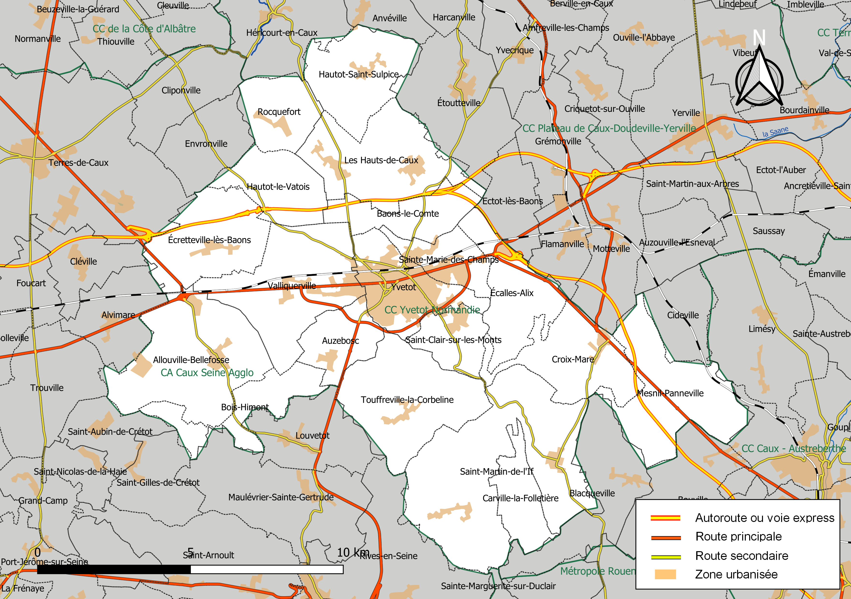 Carte géographique de la Communauté de communes Yvetot Normandie, département de la Seine-Maritime, France. Composition au 1er janvier 2019.